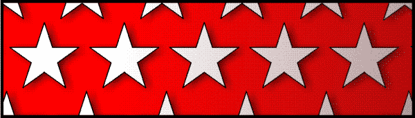 duc de empire